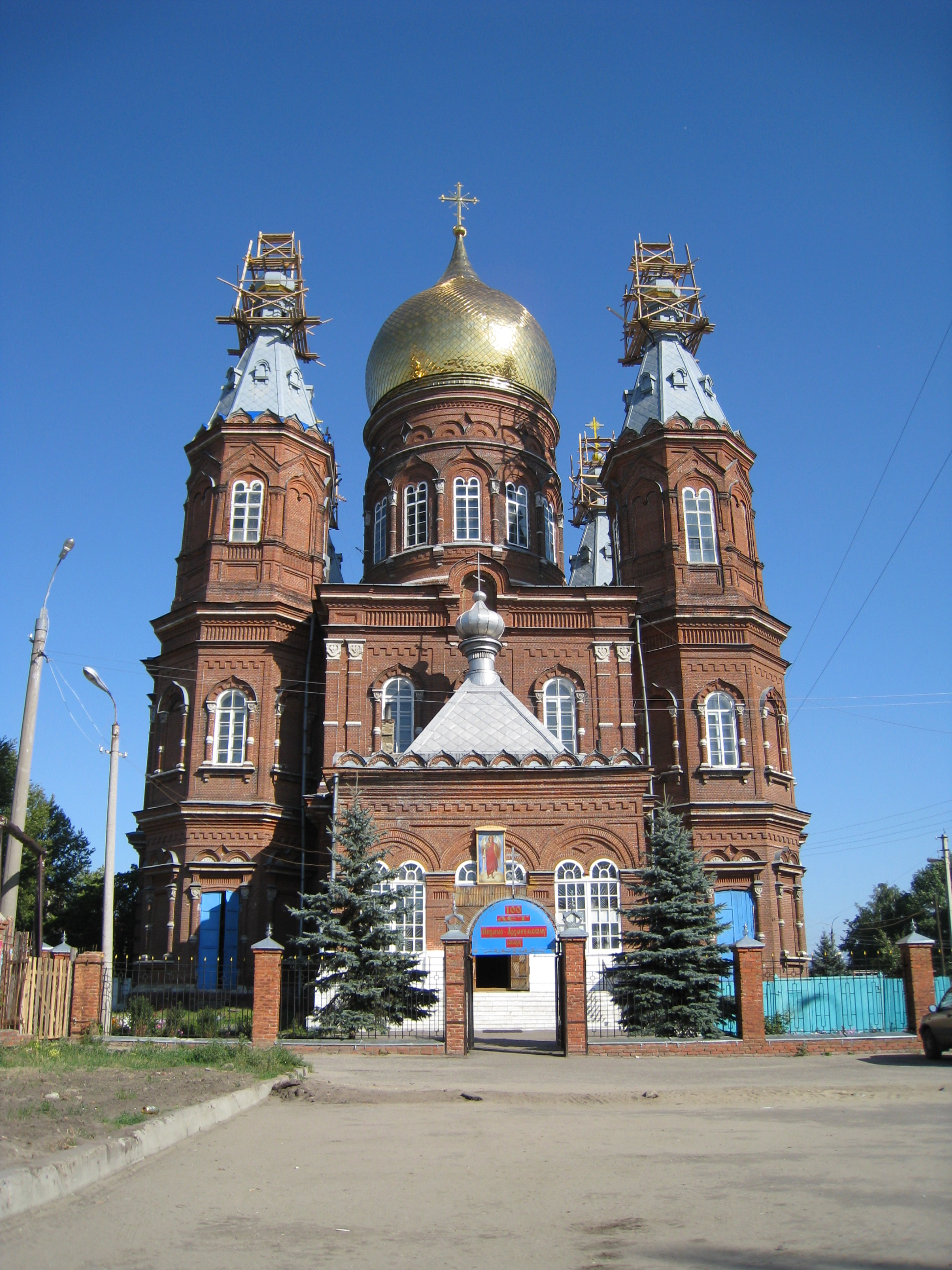 Собор Михаила Архангела, 2009 год